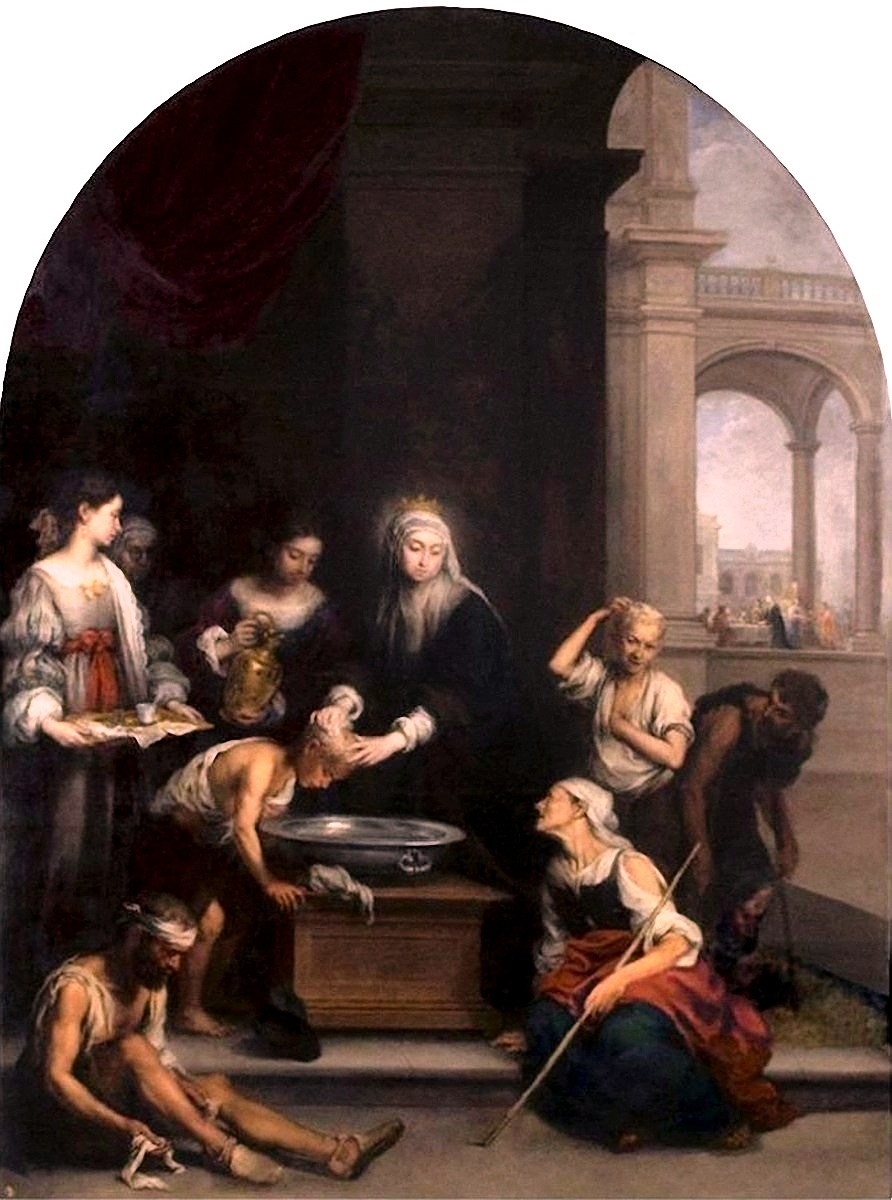 La obra representa a Santa Isabel de Hungría (1207-1231), curando a unos tiñosos.